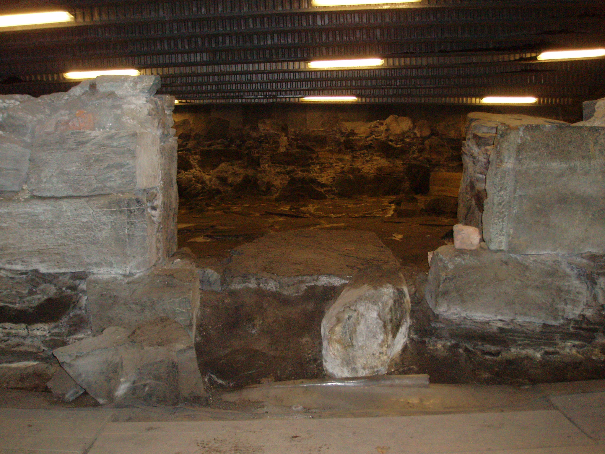 Ruinar av den gamle vinkjellaren frå mellomalderen på Bryggen i Bergen. Ruinane er no bygd inn i kjellaren i eit parkeringshus i Rosenkrantzgate 4.